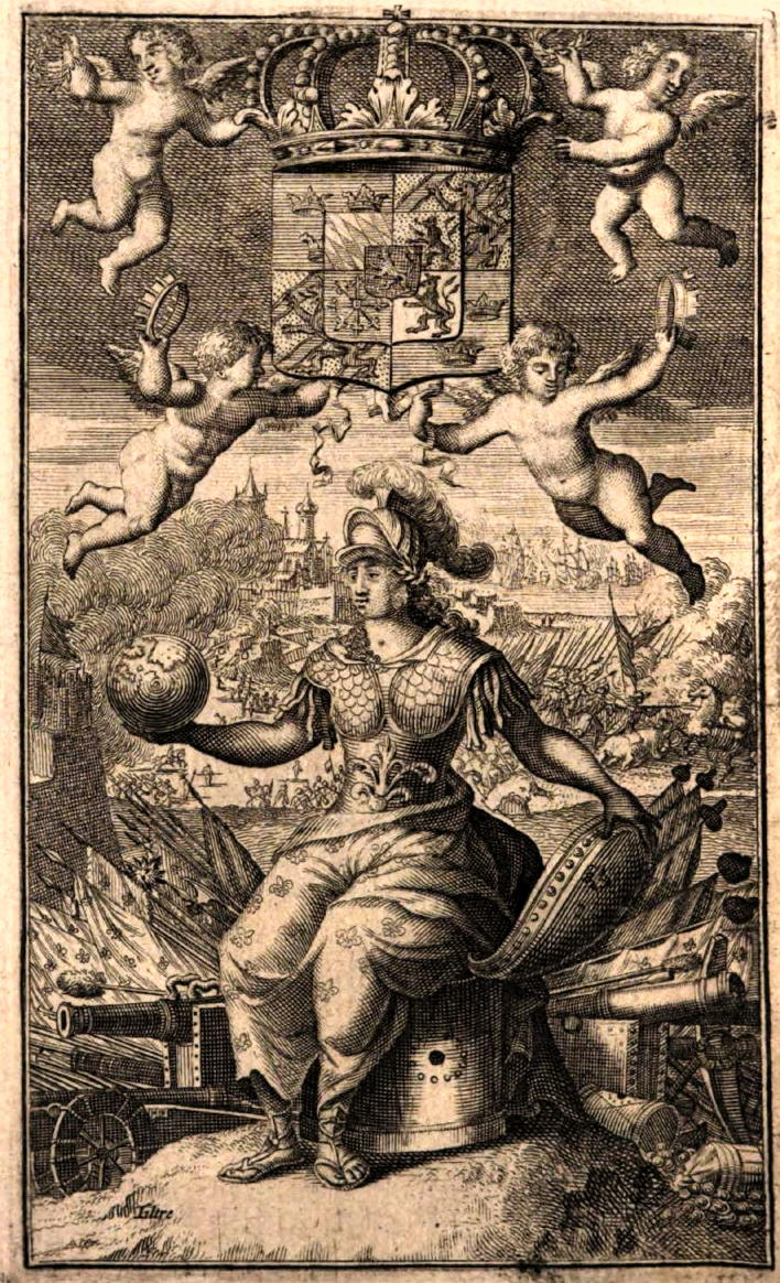 L'Histoire de Gustave-Adolphe, 1693, frontispice